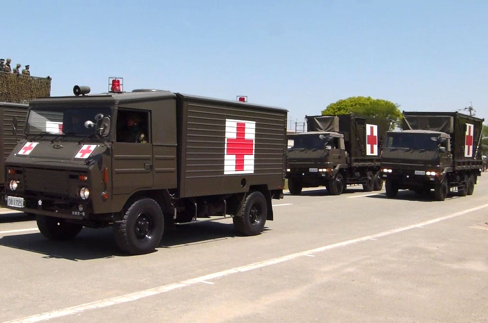 陸上自衛隊 第８後方支援連隊 衛生科部隊が運用する １トン半救急車・野外手術車